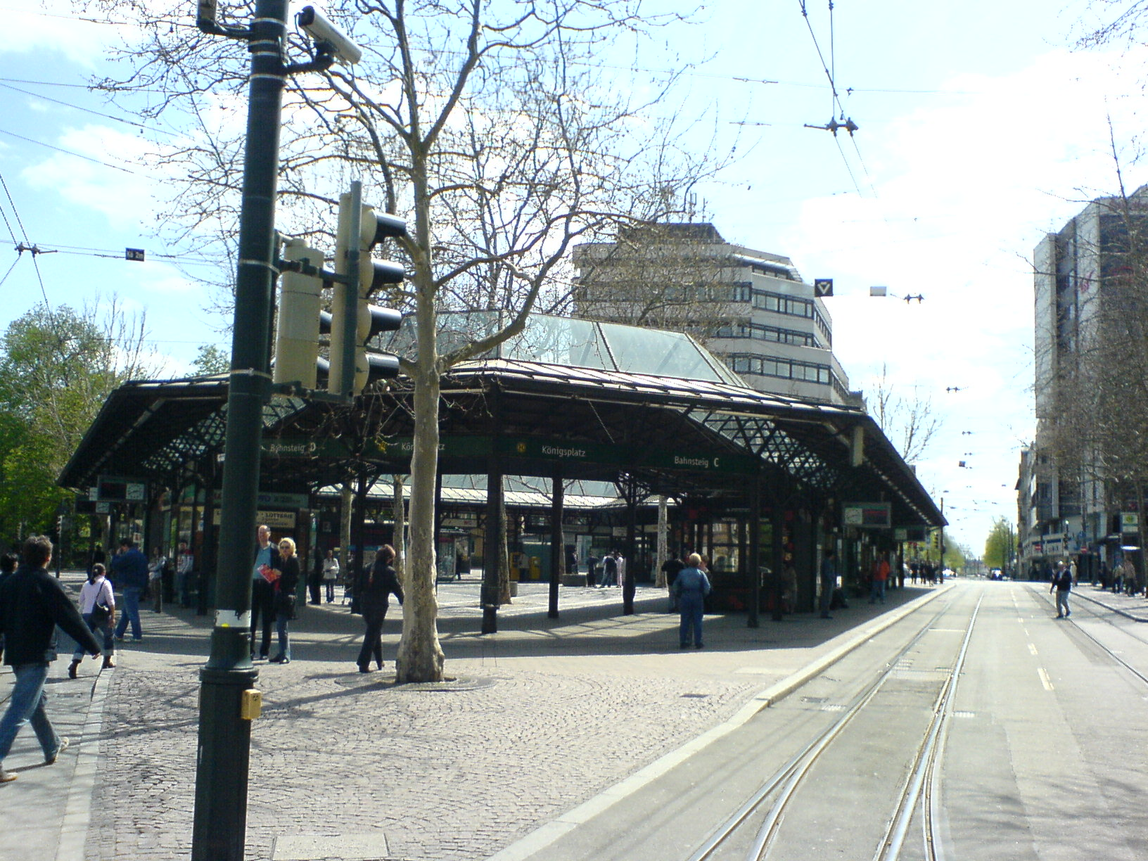 Der Königsplatz in Augsburg.